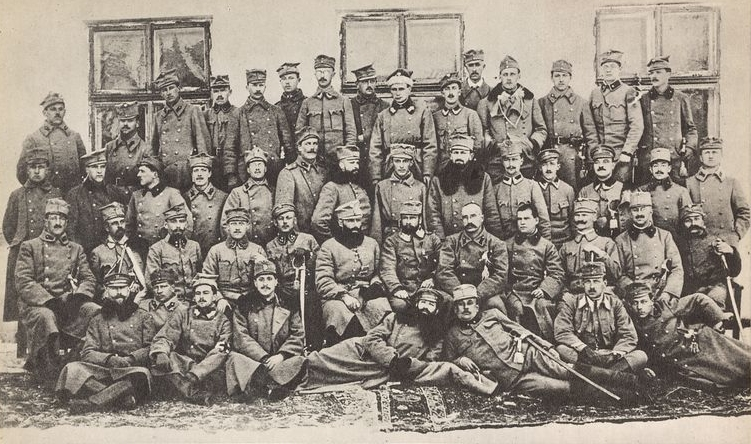 Grupa płk. Hallera w podczas odpoczynku Kołomyi. Na zdjęciu oficerowie 3 pułku piechoty oraz IV batalionu 2 pułku piechoty. Pośrodku widoczni: mjr Roja, płk Haller oraz mjr Minkiewicz.